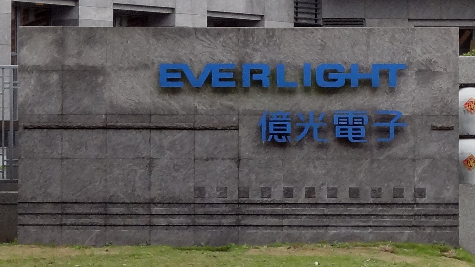 新北市樹林區中華路6之8號，億光電子全球營運總部大門左側釘掛的億光電子商標。